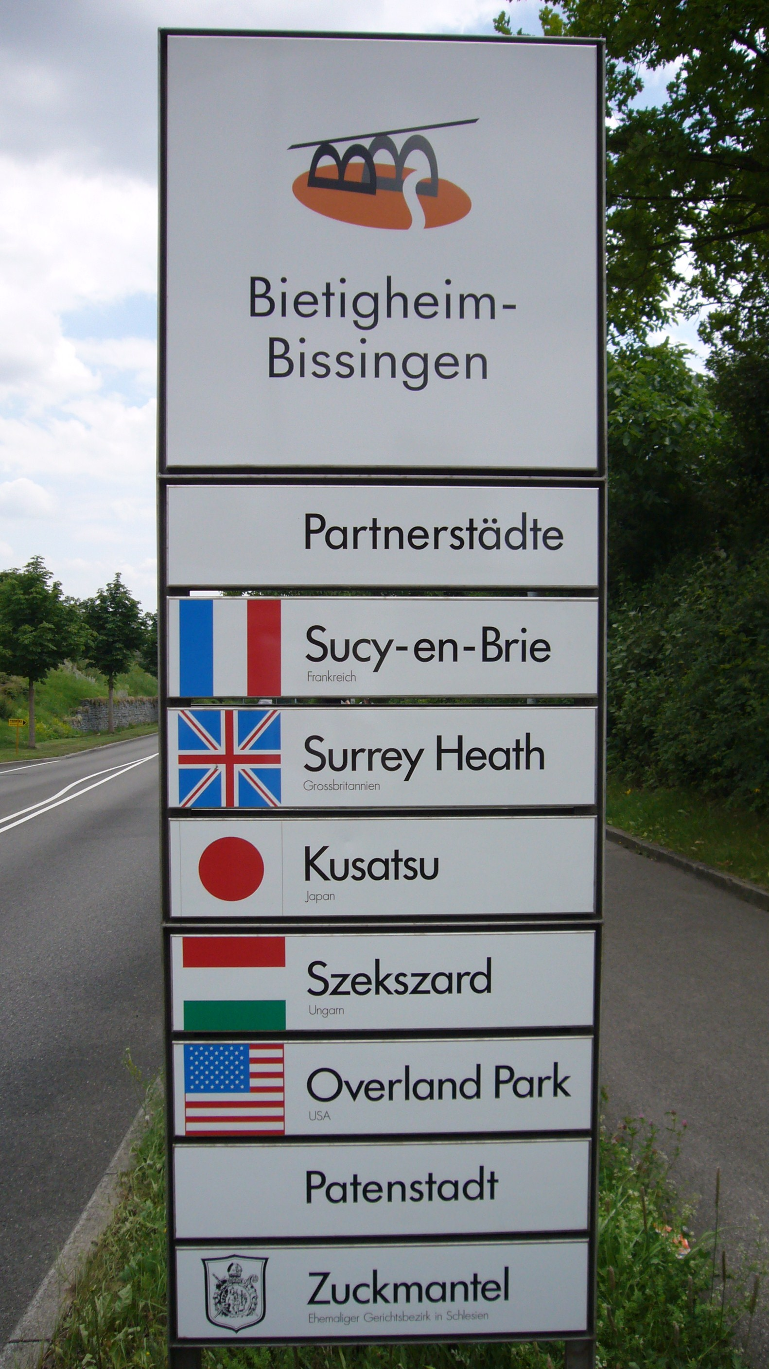 Informationstafel zu den Partnerstädten am Ortseingang der Stadt Bietigheim-Bissingen